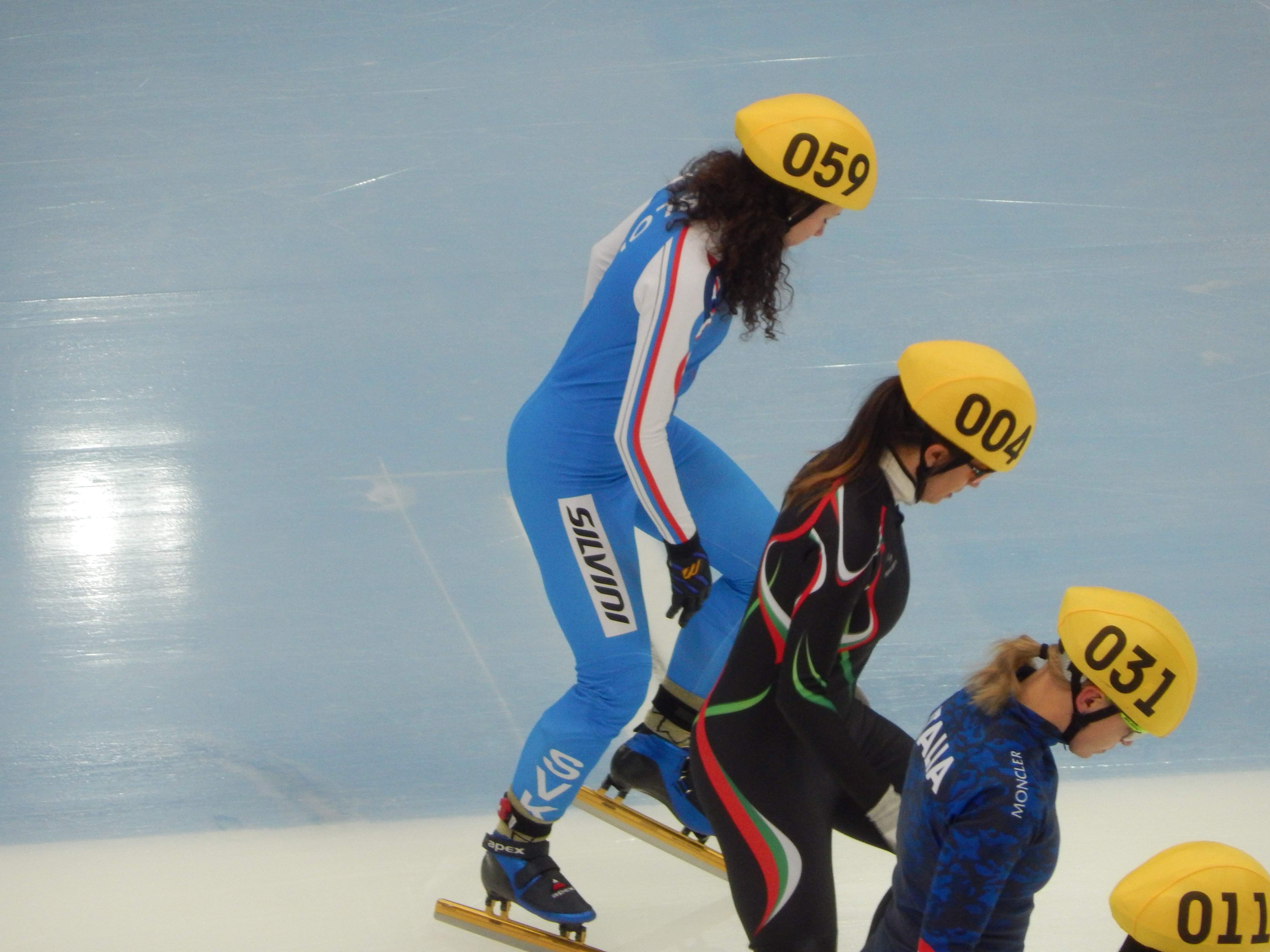 Чемпионат мира по шорт-треку 2015 в Москве Квалификационный раунд, 5 забег, 1000 м, Женщины Ариана Фонтана (031), Алица Порубшка (059) и Рая Захариева (004)